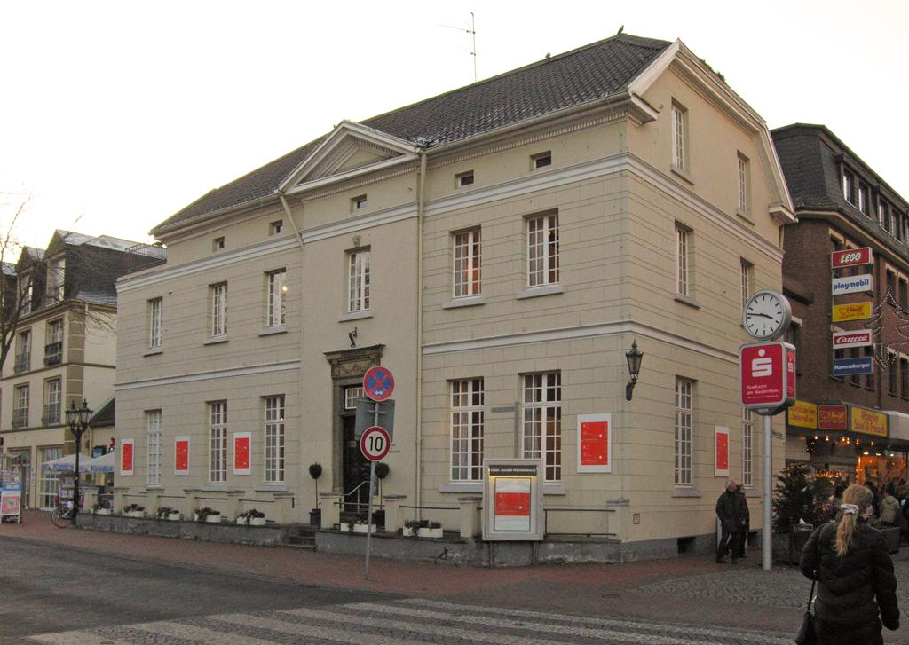 Städtische Galerie Peschkenhaus in Moers